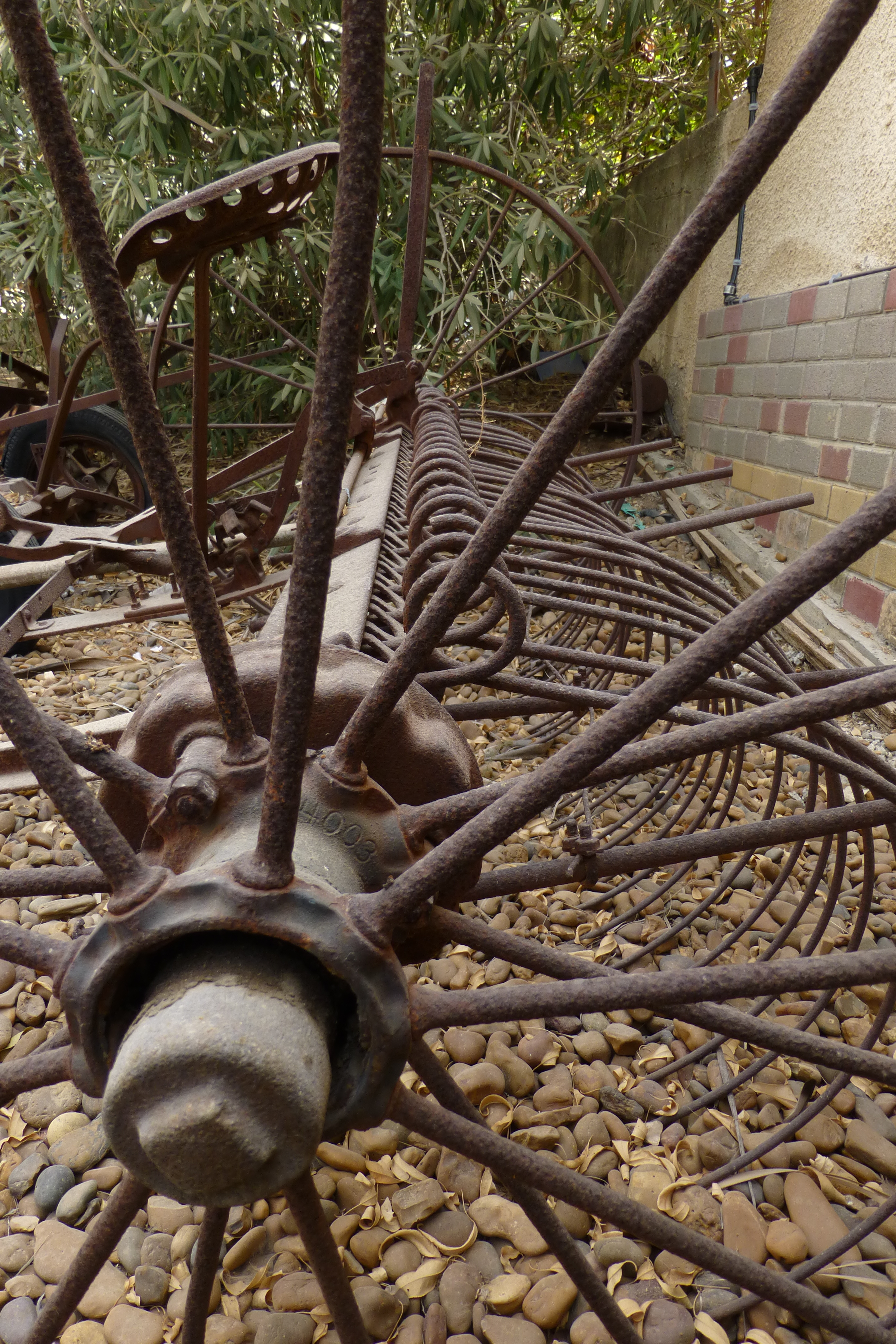 נבנה ב1924, על ידי משה ורחל מינץ. שימש בחלקו המערבי כבית מגורים ובחלקו המזרחי כבית עם. כיום הוא משכנו של מוזיאון לתולדות גדרה והביל"ויים.